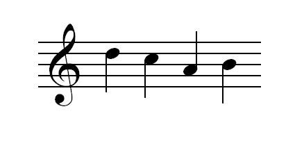 16. sajandi muusikas tavaline cambiata figuur. Kasutatud on programme Finale 2005 ja MS Paint.